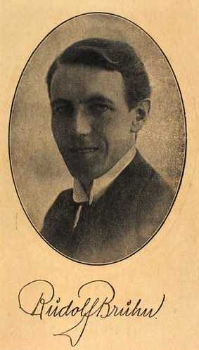 Rudolf Harald Bruhn (1889-1918), lærer, forfatter